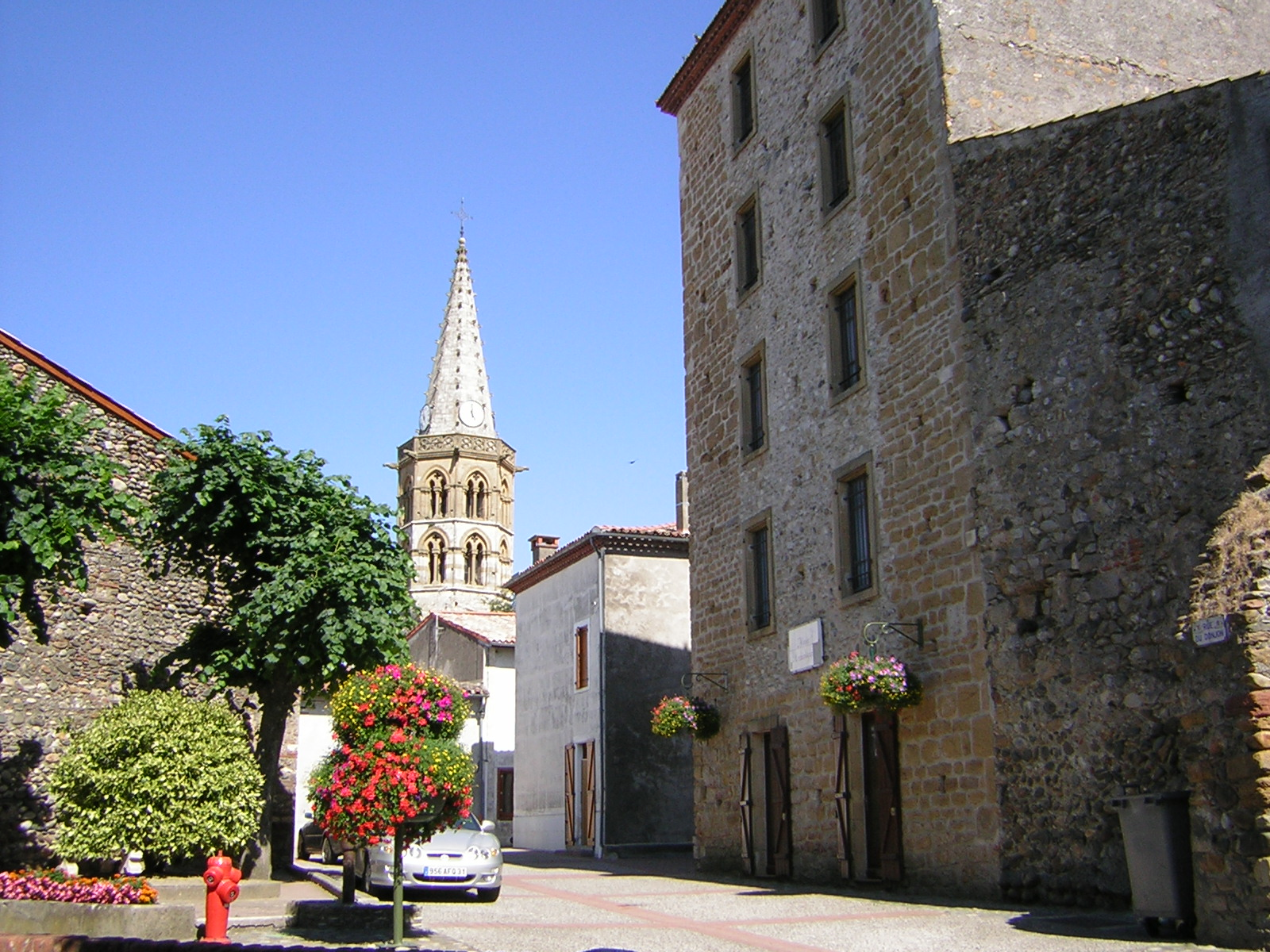 Martres-Tolosane (Haute-Garonne, Midi-Pyrénées, France) - Rue du Donjon et musée archéologique.